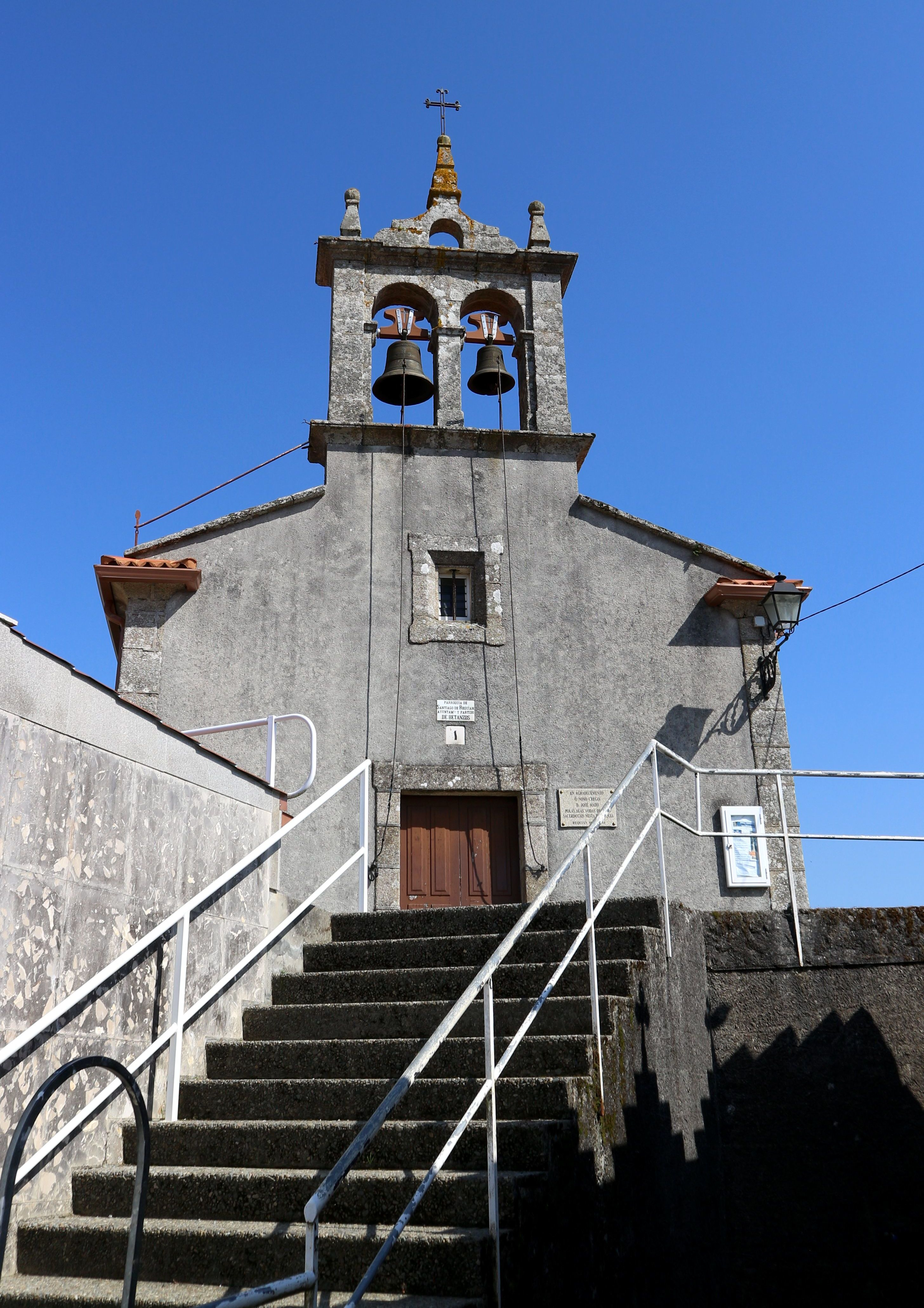 Igrexa de Santiago de Requián. Requián, Betanzos.